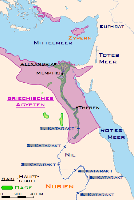 Ausdehnung des alten ägytischen Reiches (griechische Zeit) Karte wurde selbst erstellt